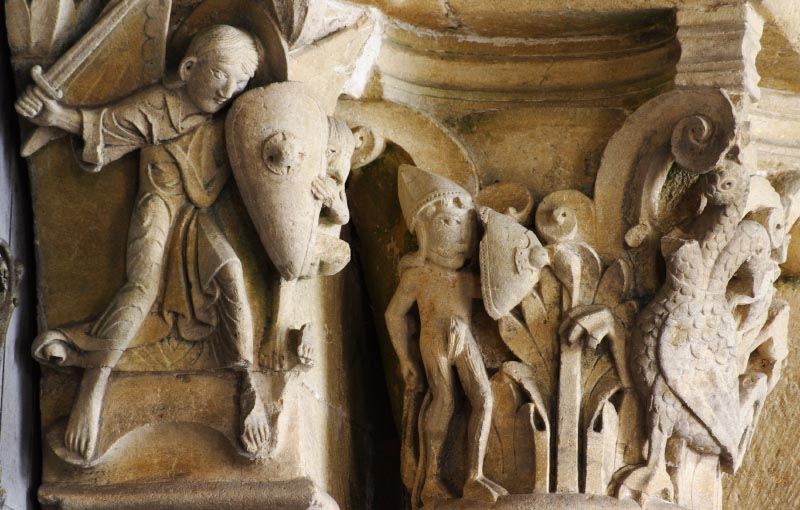 Chapiteau du portail de l'église de Perrecy-les-Forges